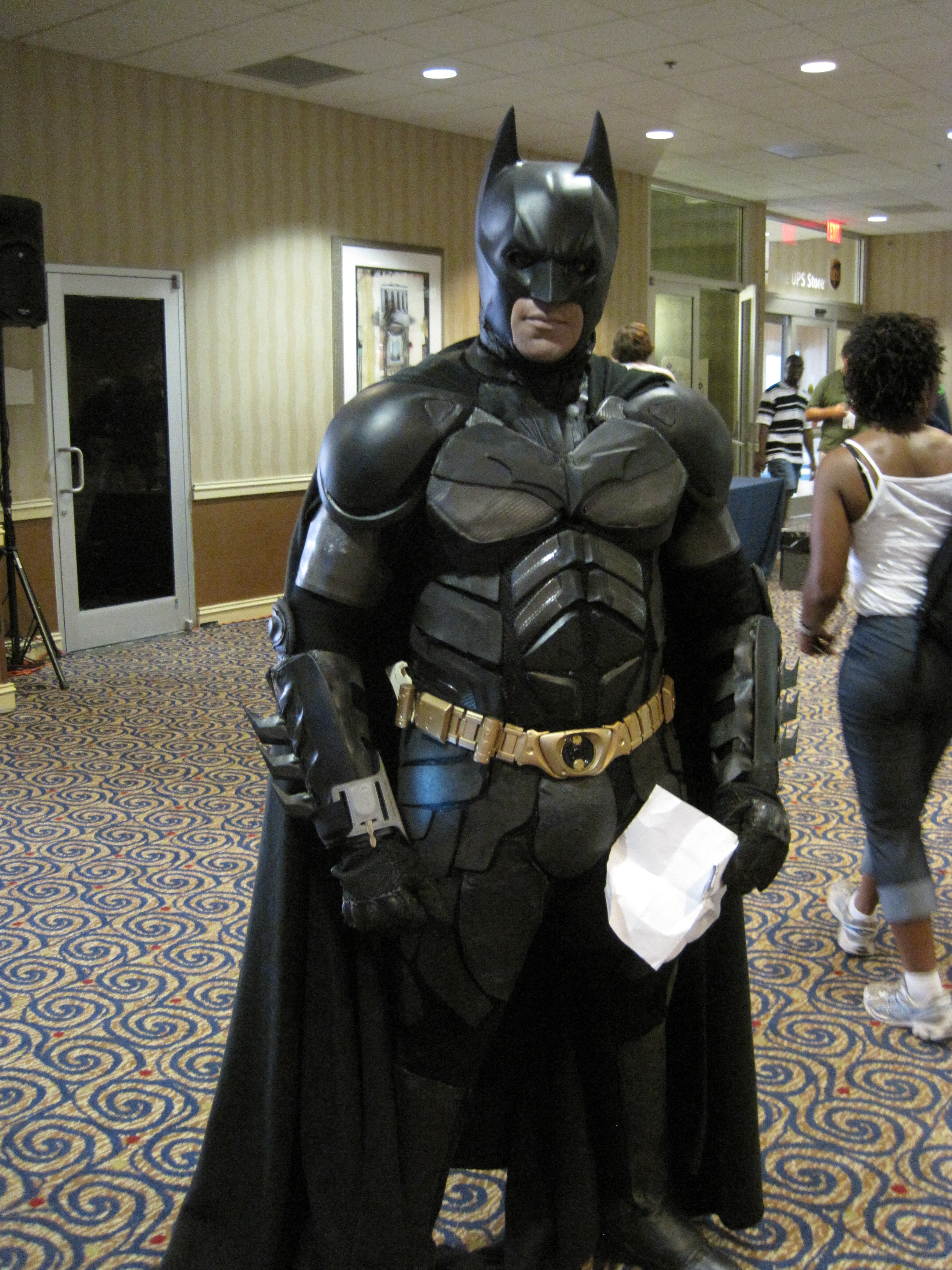 Batman Cosplay - Dragon Con 2012 (Saturday)